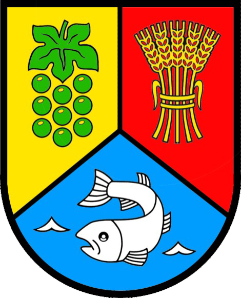 Wappen des Berliner Ortsteils Müggelheim. 1947 zur 200-Jahr-Feier durch den Lehrer Curt Steinmetz entworfen.